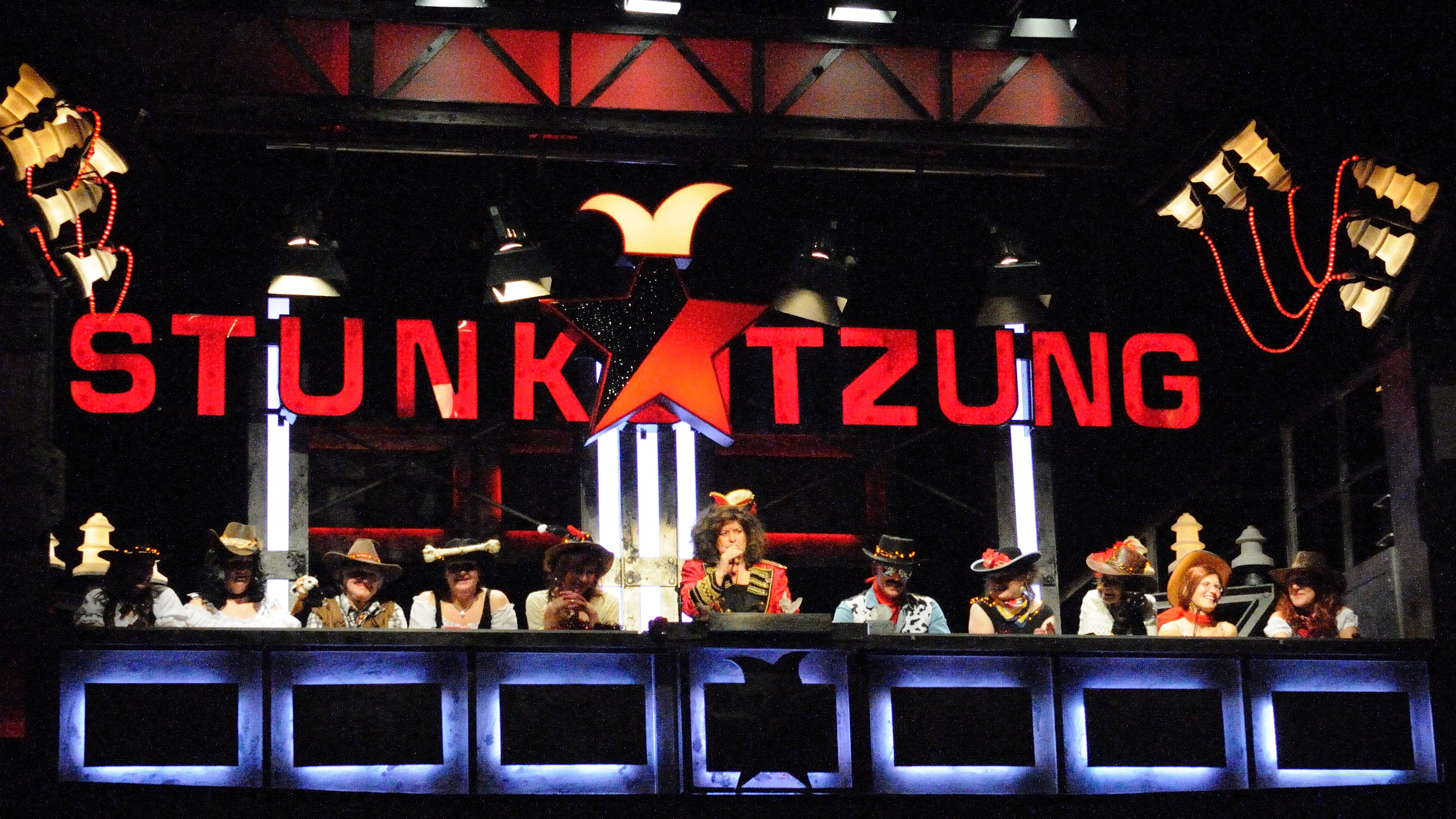 Sitzungspräsidentin Biggi Wanninger und Elferrat bei der Stunksitzung am 8.2.2013 im Kölner E-Werk